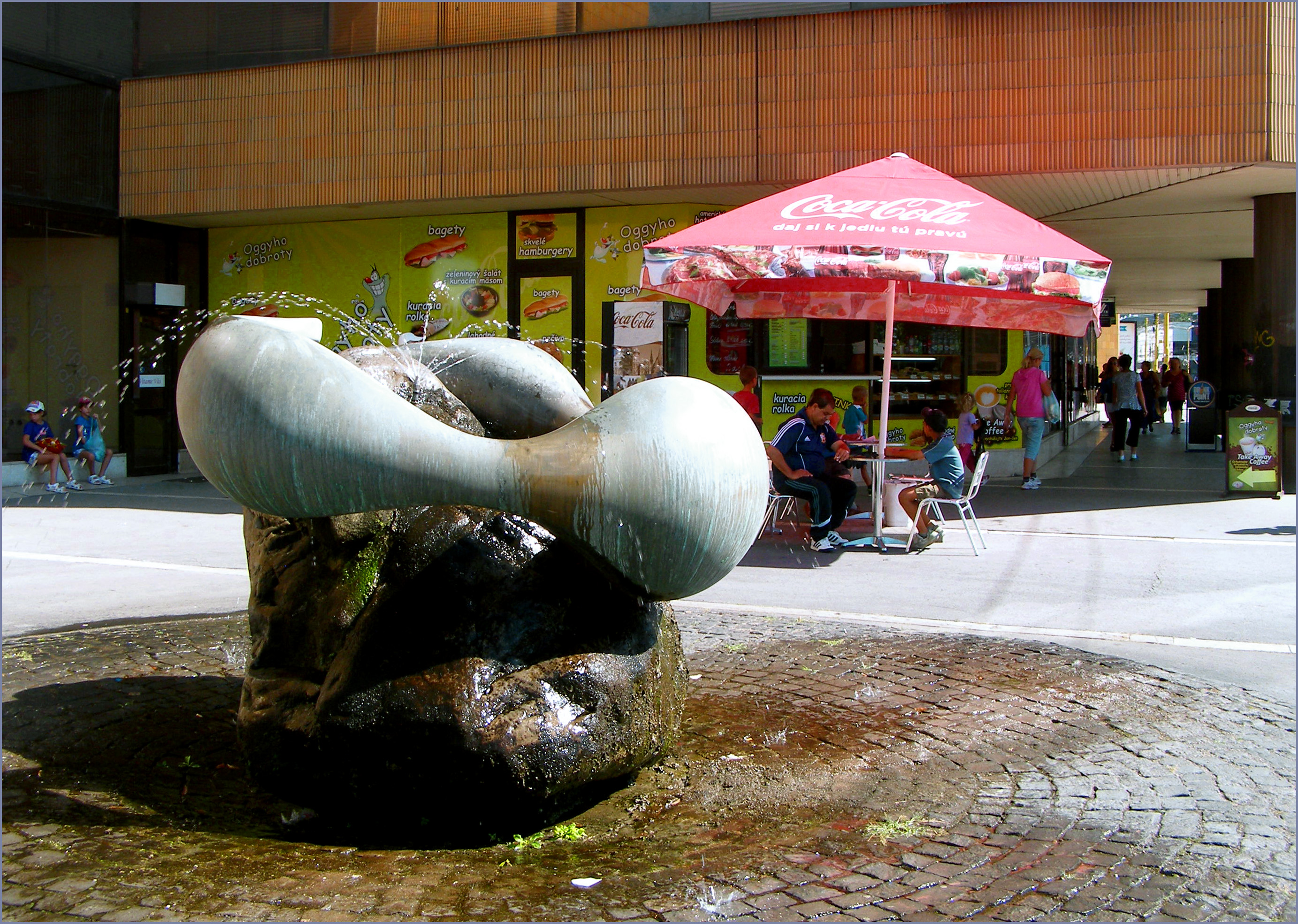 Fontána pri obchodnom dome Dargov